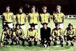 L'équipe d'Allemagne de l'Est de football, médaillée de bronze aux JO de 1972, 'Munchen 72', 'Panini figurina n°43